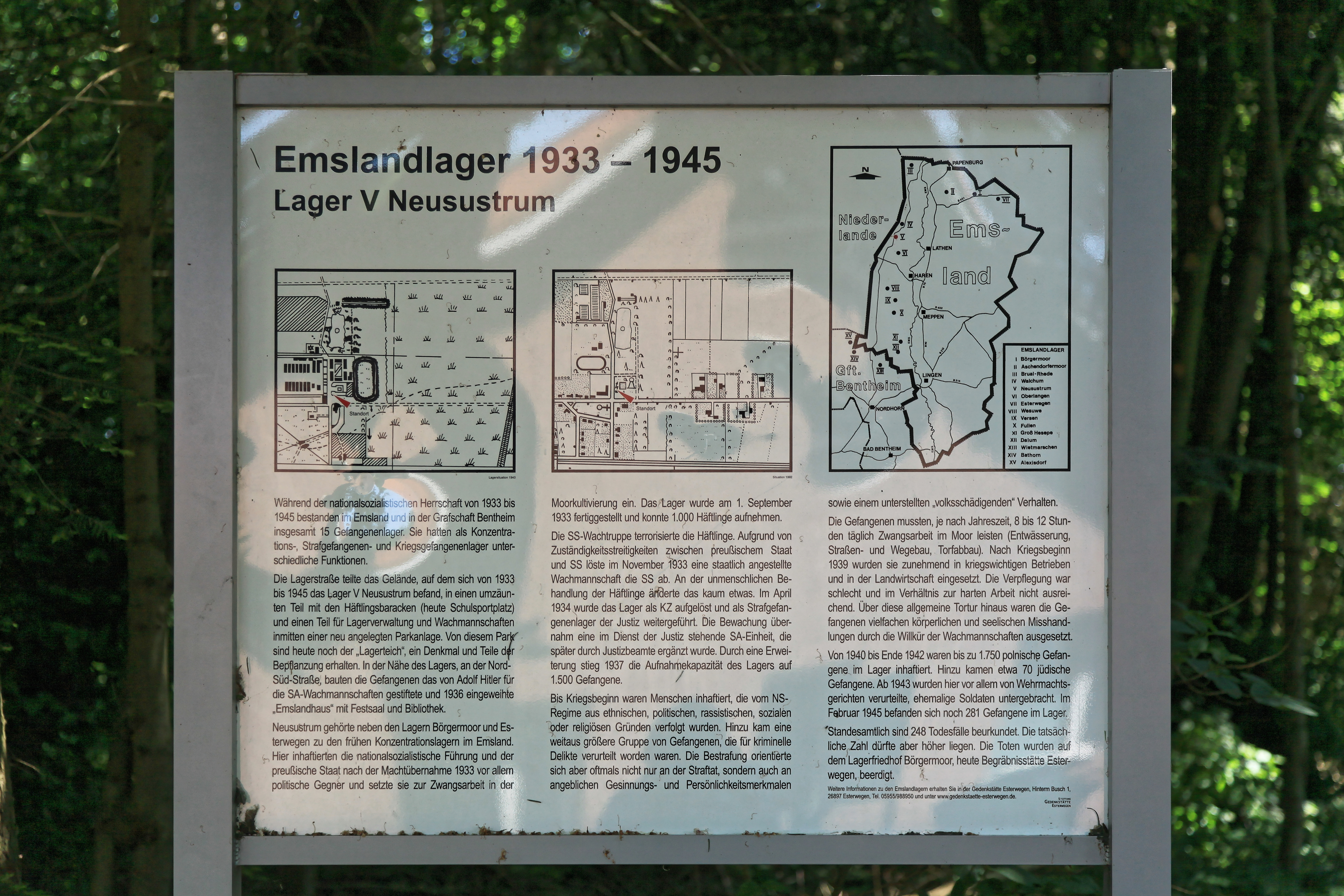 Gedenkstätte an und im Park des ehemaligen KZ Neusustrum (Lager V der Emslandlager), Teichstraße in Sustrum-Moor, Sustrum